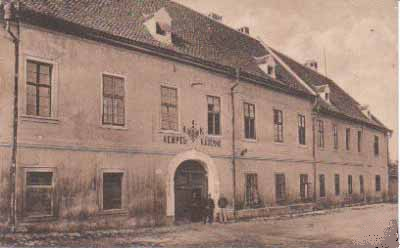 k.u.k. Kempel Kaserne in Hermannstadt/Siebenbürgen